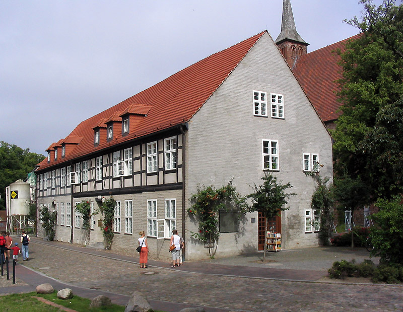 dieses Gebäude beinhaltet das Stadtarchiv (linker Teil) und die Stadtbibliothek (rechter Teil)